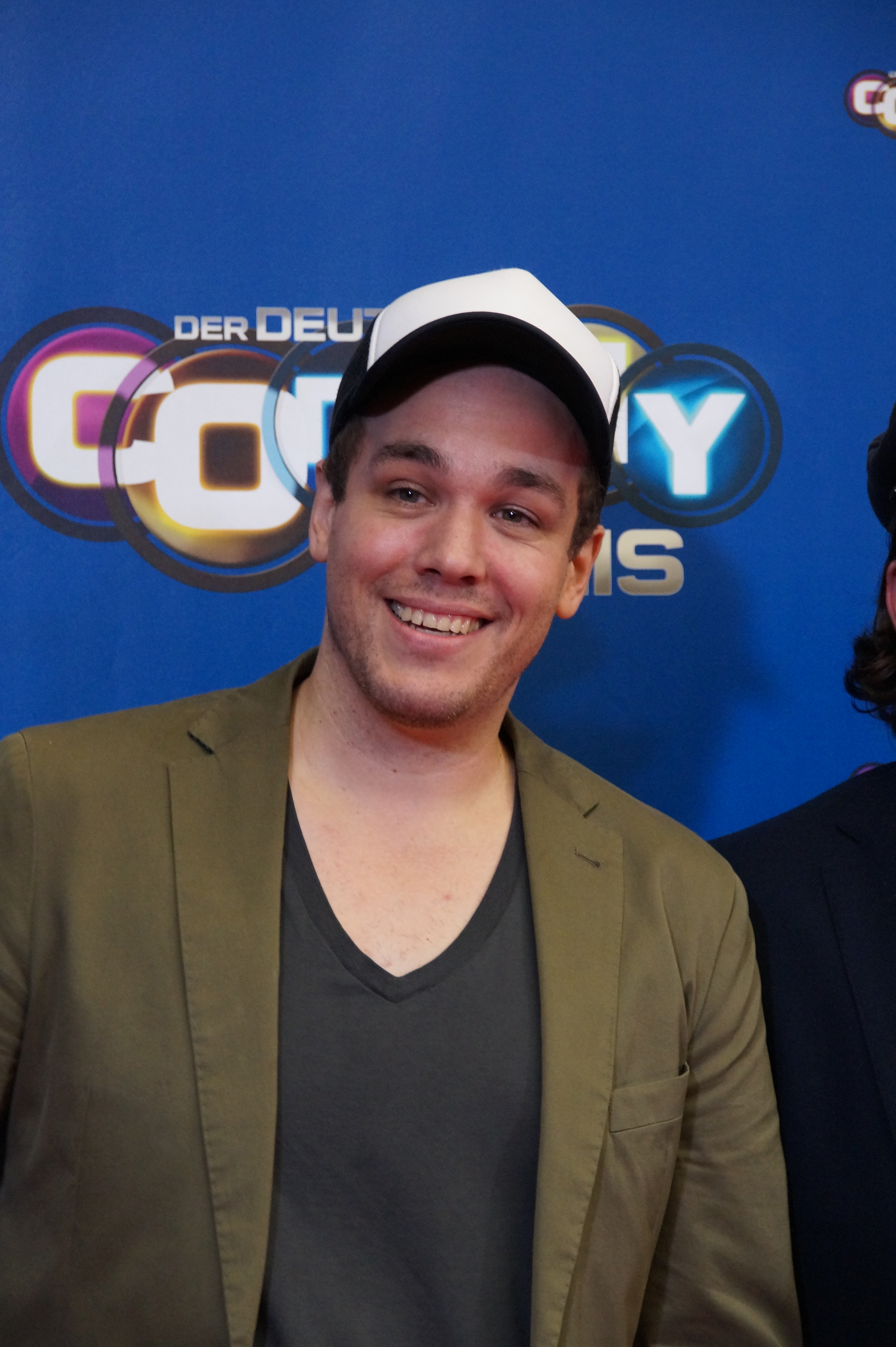 Jan van Weyde beim Comedypreis 2016, im Oktober, Köln.